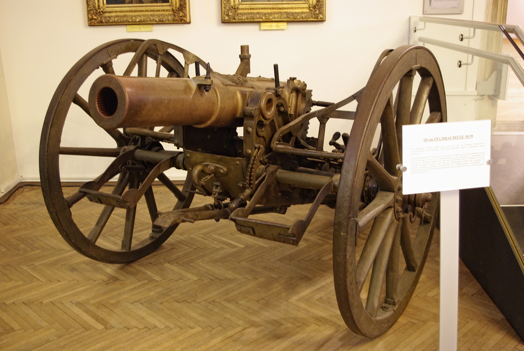 10cm Feldhaubitze M99